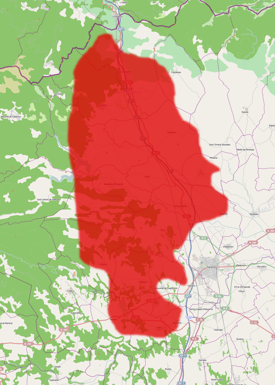 Territori afectat pels incendis de l'Alt Empordà de 2012 This map may be incomplete, and may contain errors. Don't rely solely on it for navigation.